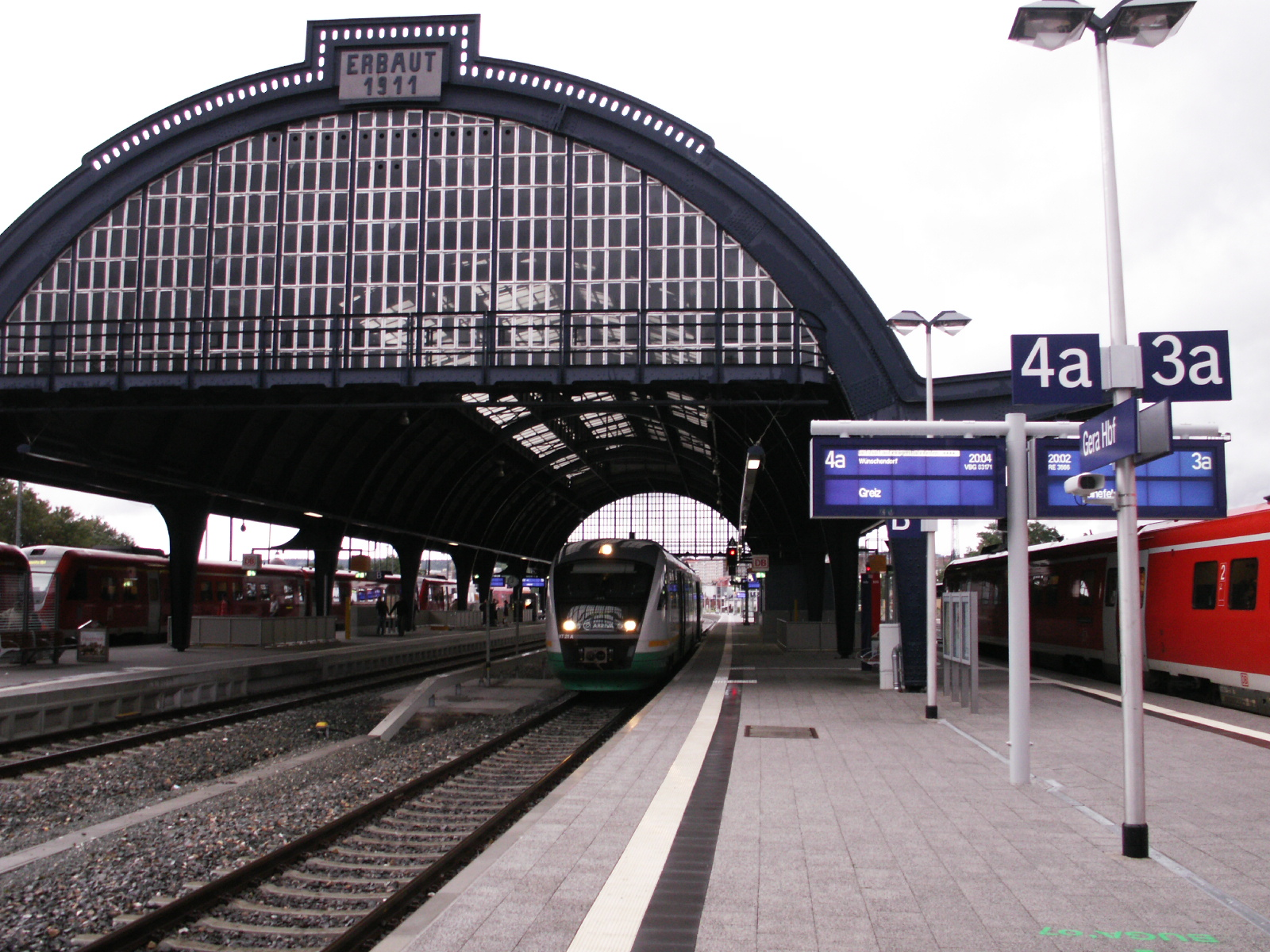 Gera Hbf